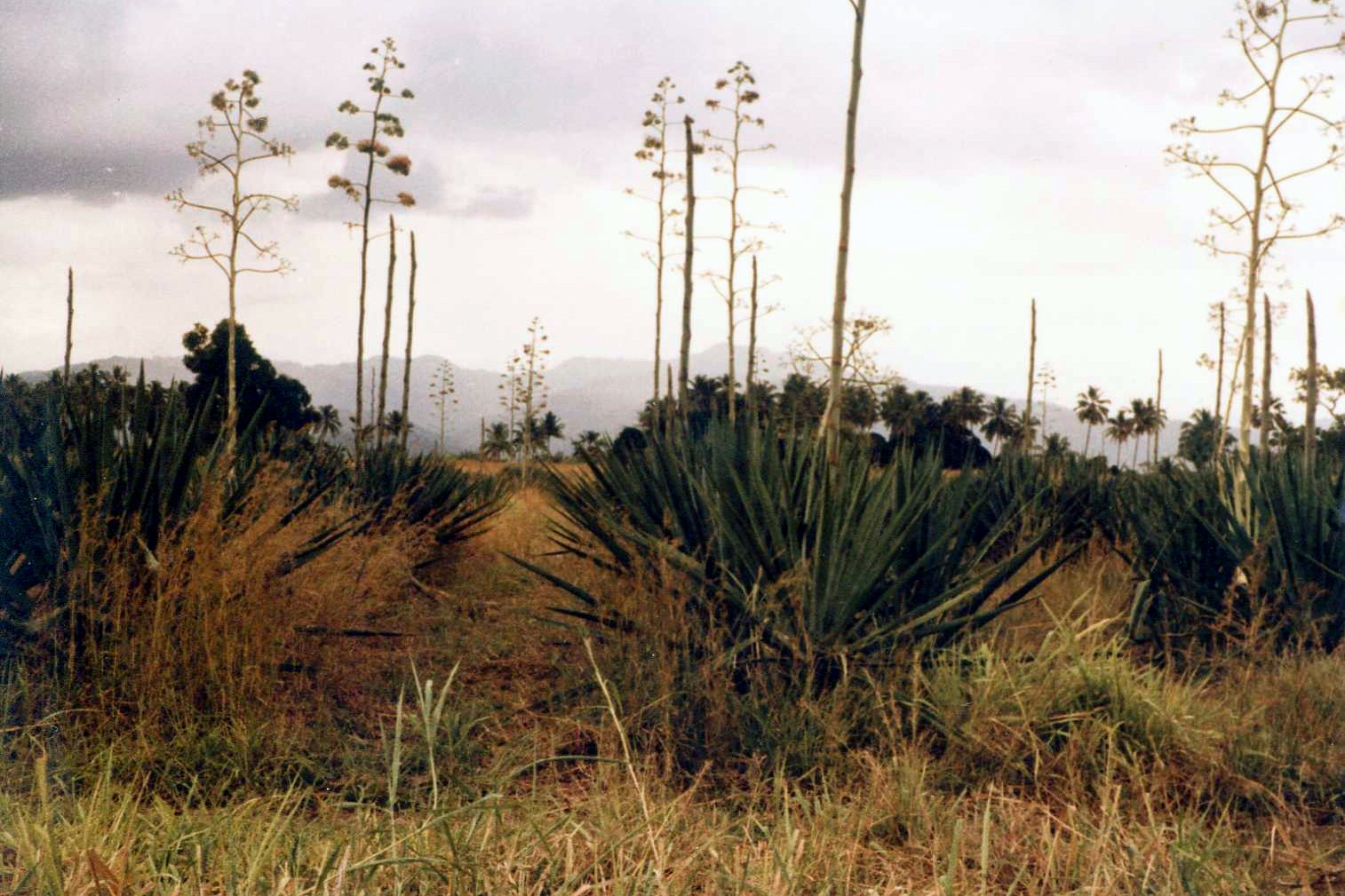 Sisal farm in Kilosa